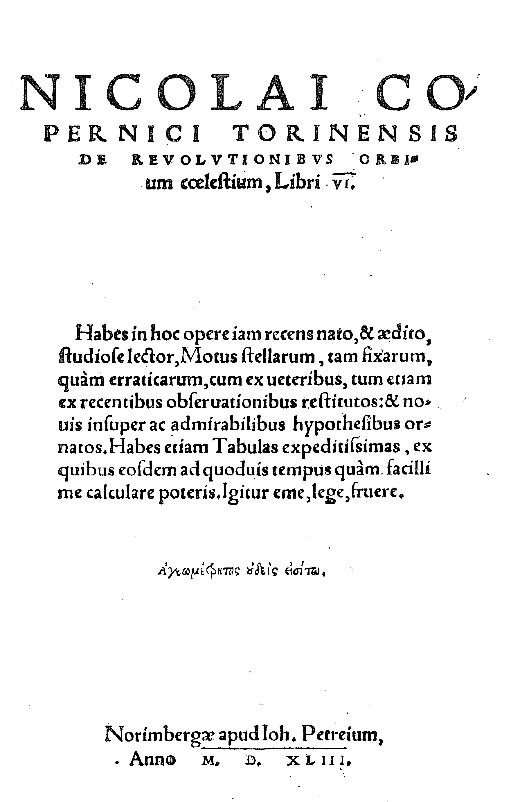 Nicolai Copernici Torinensis De reuolutionibus orbium coelestium, Libri 6. Habes in hoc opere iam recens nato, & aedito, studiose lector, motus stellarum, tam fixarum, quam erraticarum,cum ex ueteribus, tum etiam ex recentibus obseruationibus restitutos: & nouis isuper ac admirabilibus hypothesibus ornatos. Habes etiam Tabulas expeditissimas, ex quibus eosdem ad quoduis tempus quam facillime calculare poteris. Igitur eme, lege, fruere. - Norimbergae : apud Ioh. Petreium, 1543 (Norimbergae : apud Ioh. Petreium, 1543). - [6], 196 c. : ill. ; 2° .